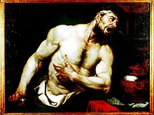 Suicídio de Catão de Utica